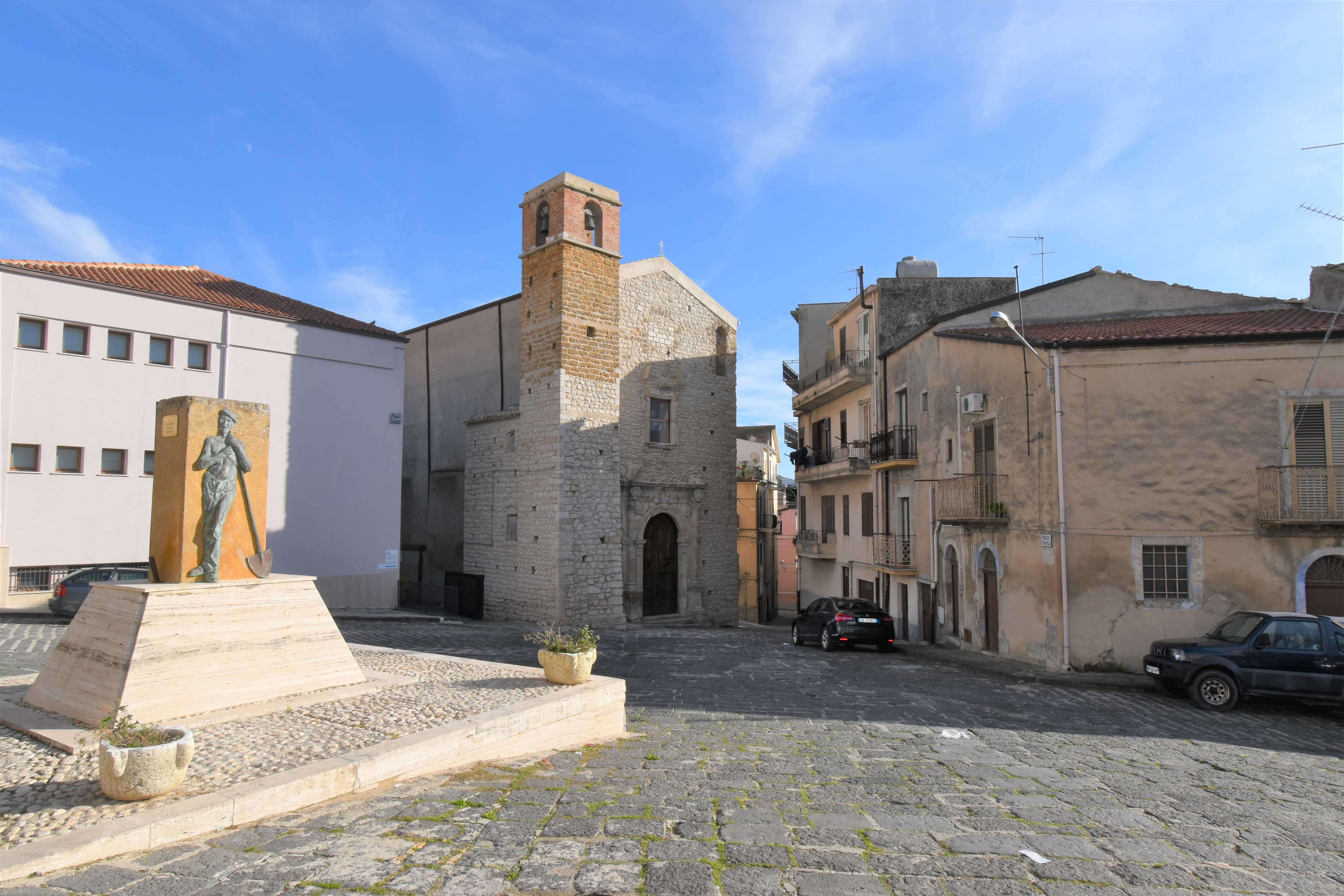 Bivona - Piazza San Paolo